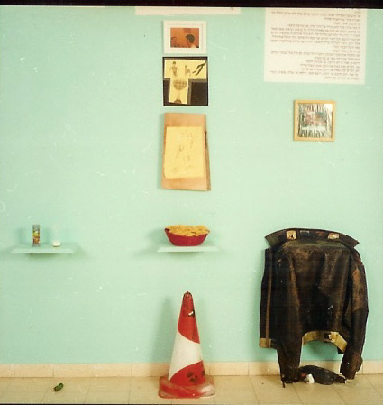 עבודה של גליה יהב